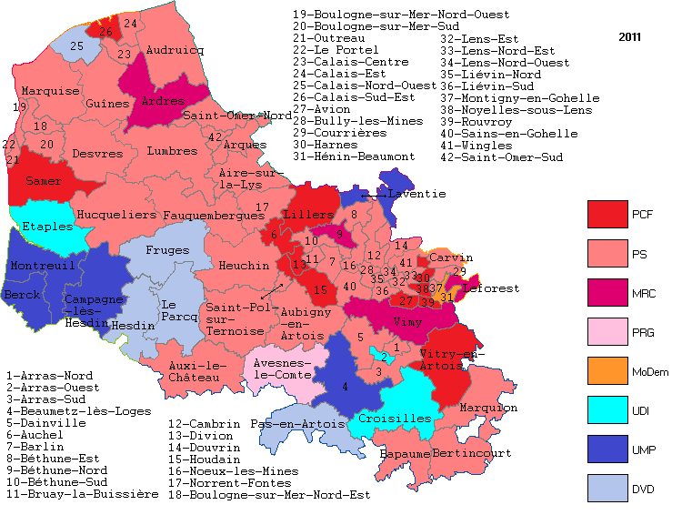 Carte des cantons du Pas-de-Calais et étiquette politique en 2011.